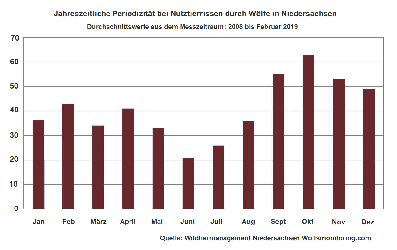 Jahreszeitliche Periodizität bei Nutztierrissen durch Wölfe in Niedersachsen [1]